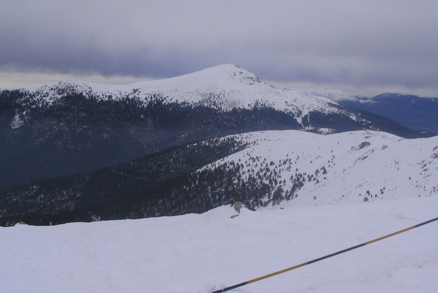 Peak of Peñalara, Sierra de Guadarrama